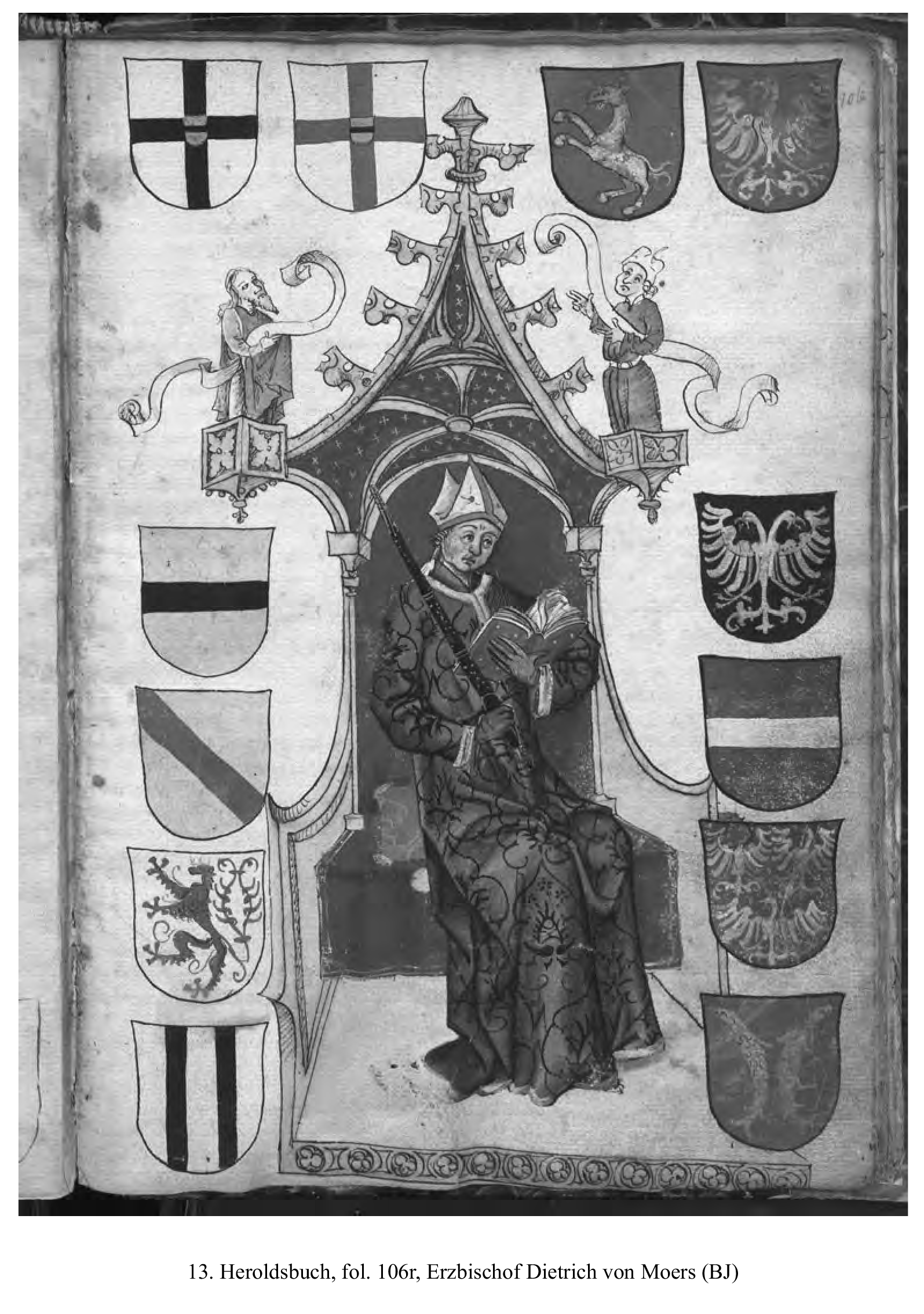 Erzbischof Dietrich von Moers. Heroldsbuch Krakow, Bibl. Jagiellionska, mgq 1479, Blatt 106r.